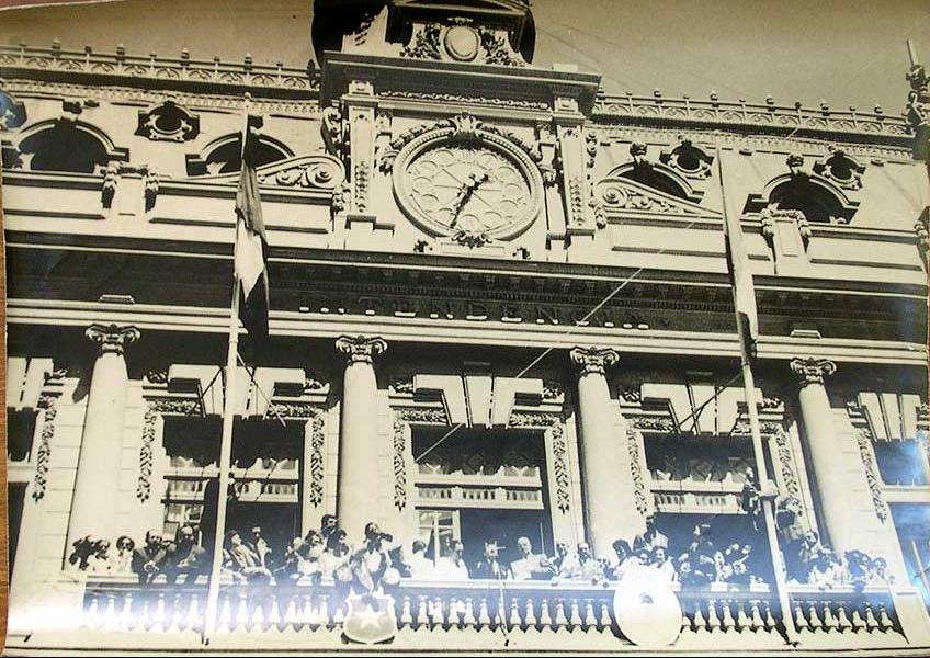 Imágenes Antiguas de La Plaza Sotomayor y alrededores, en Valparaíso, Chile.